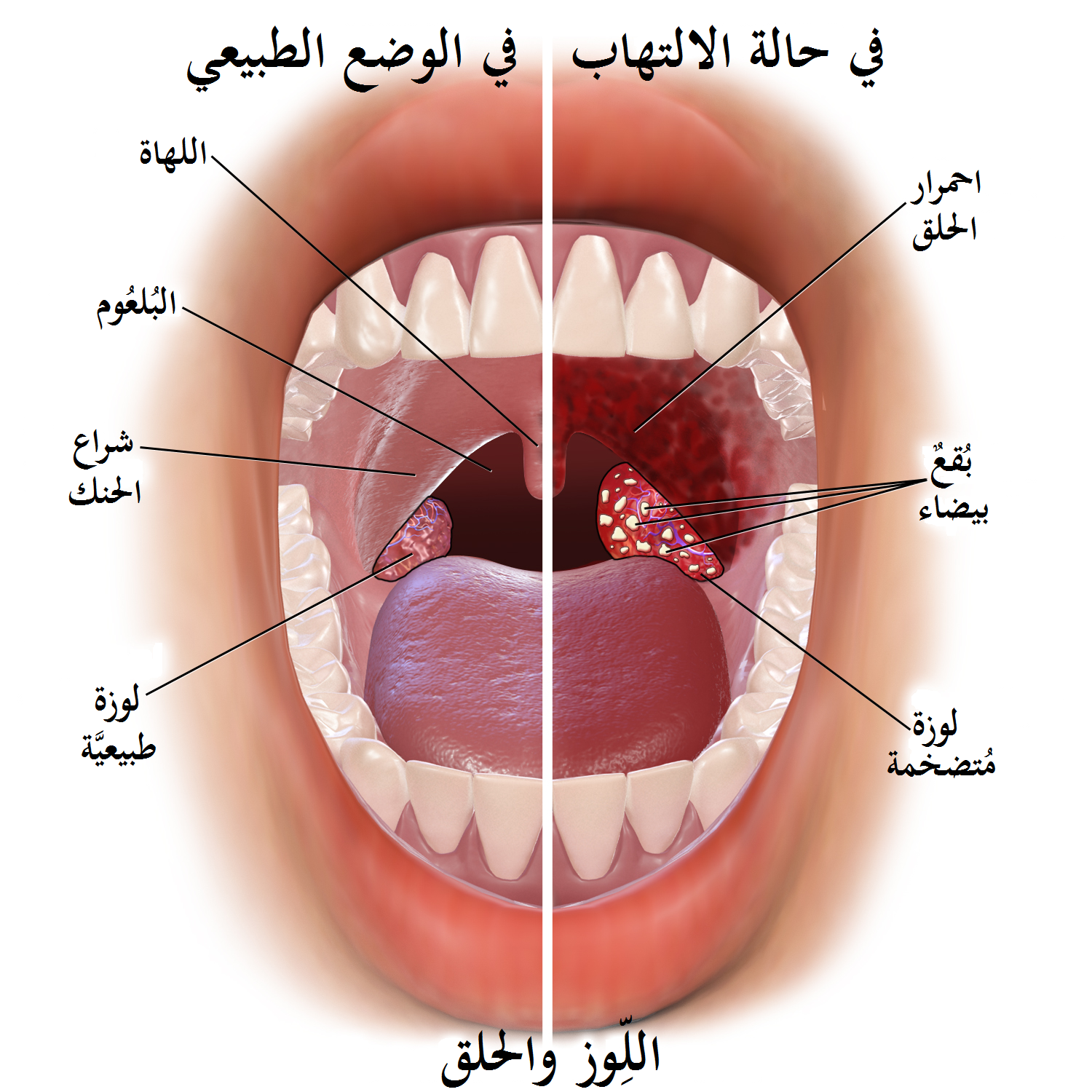 رسمٌ توضيحي يُقارن بين الوضع الطبيعي لِلِوز الحلق وفي حالة الالتهاب.